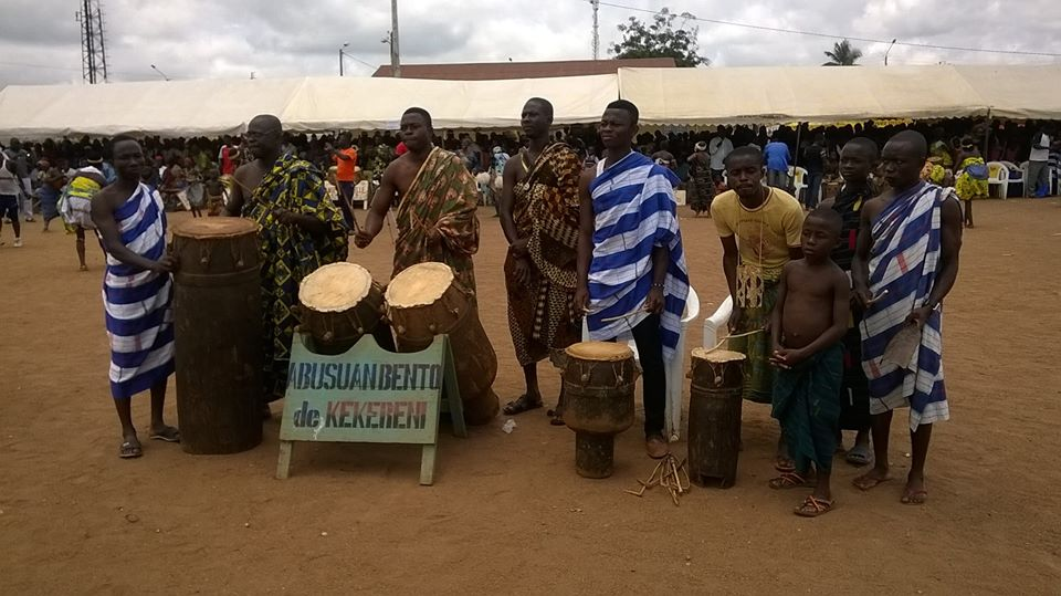 Le Bentô